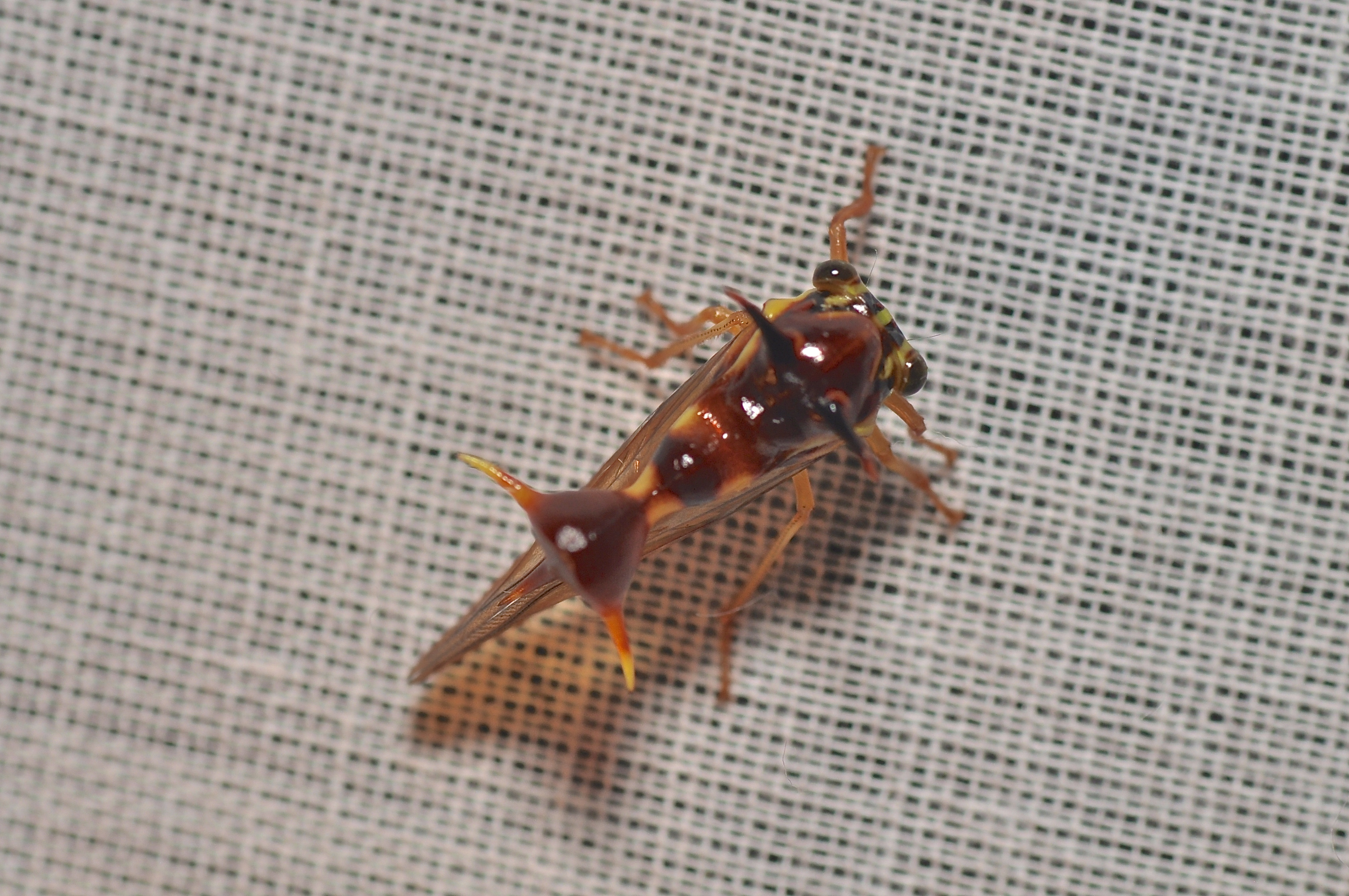 Treehopper Heteronotus sp.